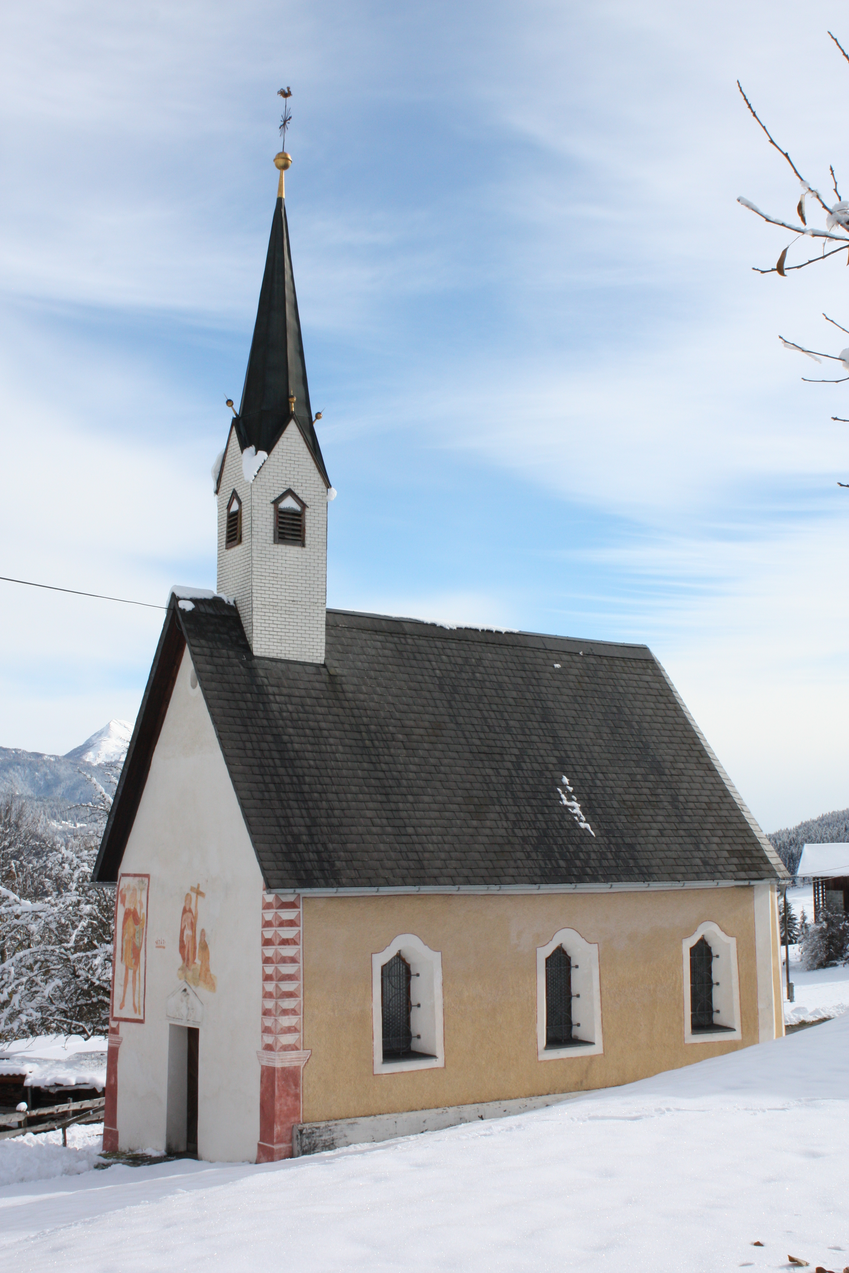 Kath. Filialkirche hl. Antonius von Padua